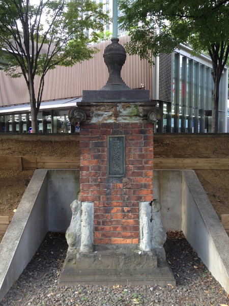 Monument of Imperial College of Engineering, Toranomon, Tokyo.